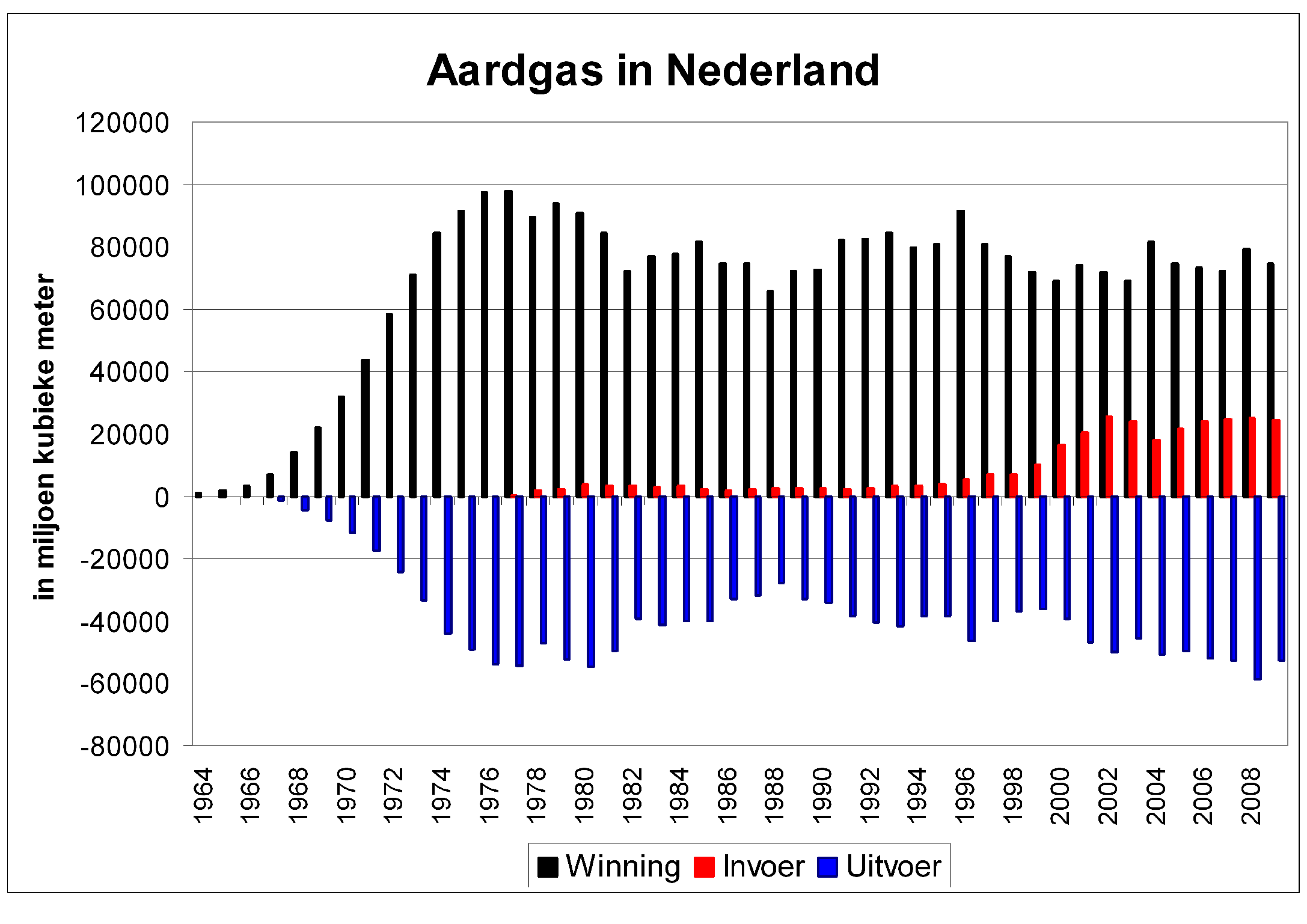 Informatie over de gas productie in Nederland vanaf begin jaren 60 en overzicht van jaarlijkse gas export en import. (Bron